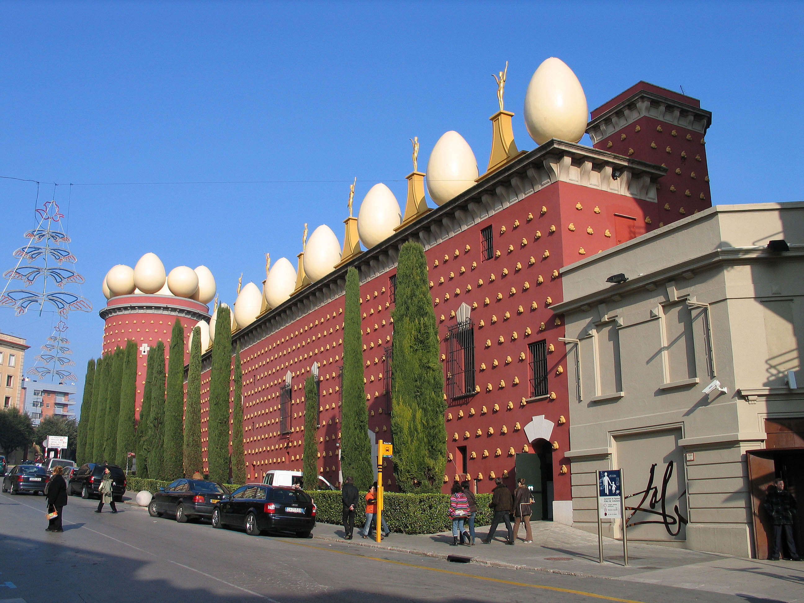 Teatro-Museo Dalí, Figueres Photograph: Luidger (27. Dezember 2006)